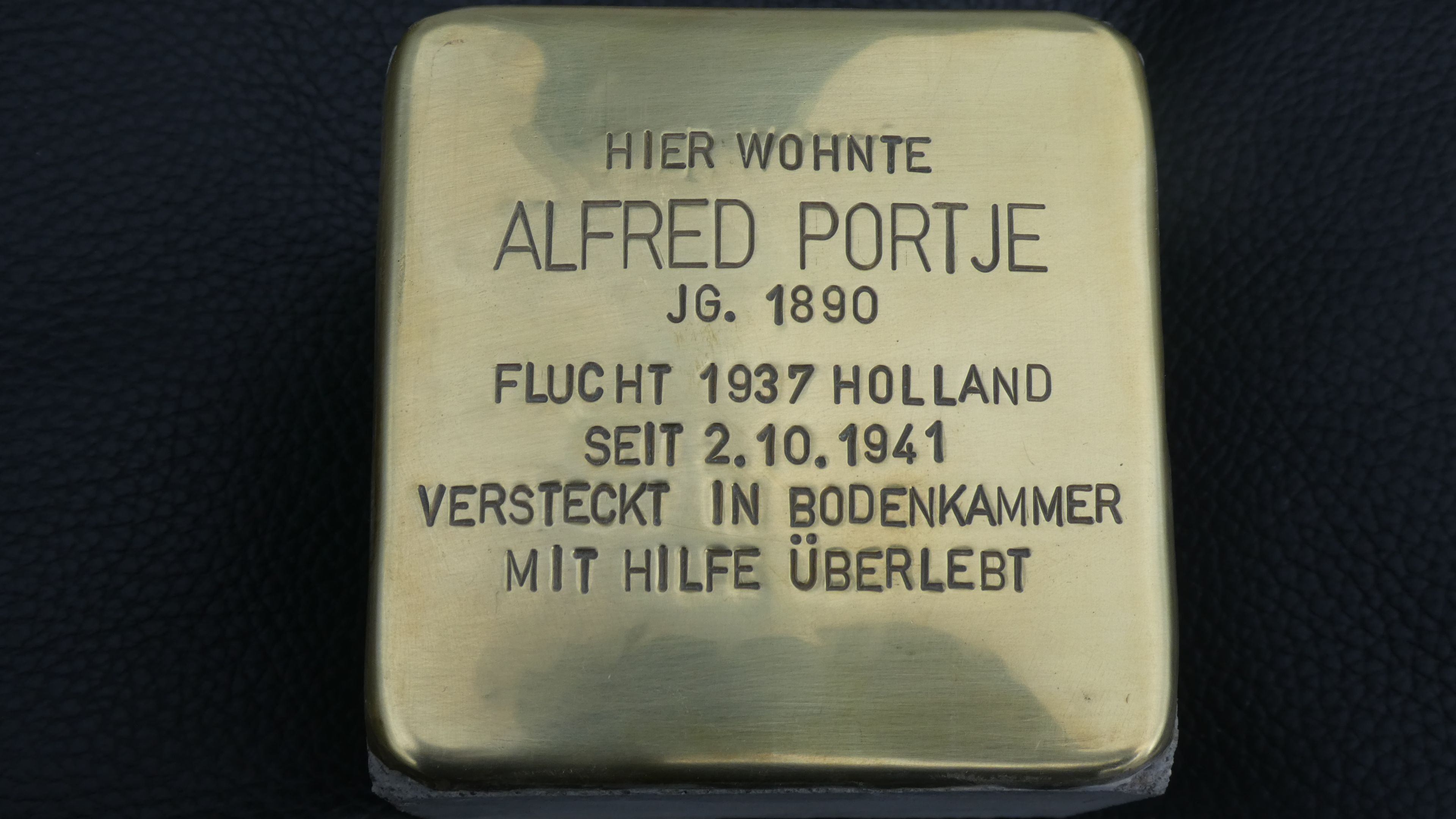 Alfred Portje, 2018